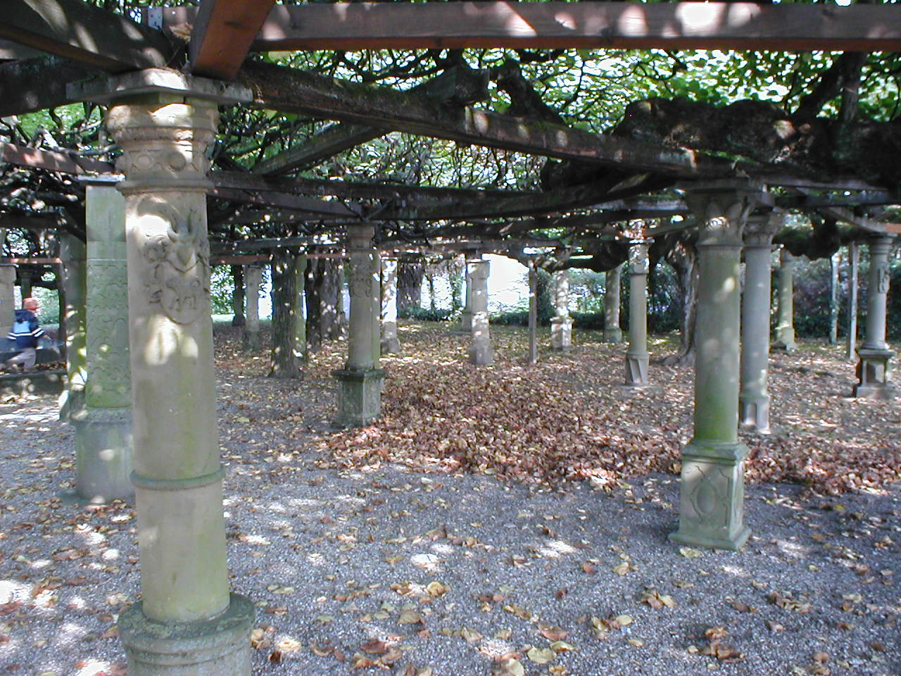 Lindenanlage in Neuenstadt am Kocher, bis 1945 Standort einer 1000-jährigen Linde, mit ca. 100 Sandsteinsäulen, die Bürger und Adlige vom 16. bis 18. Jhd. gestiftet haben.